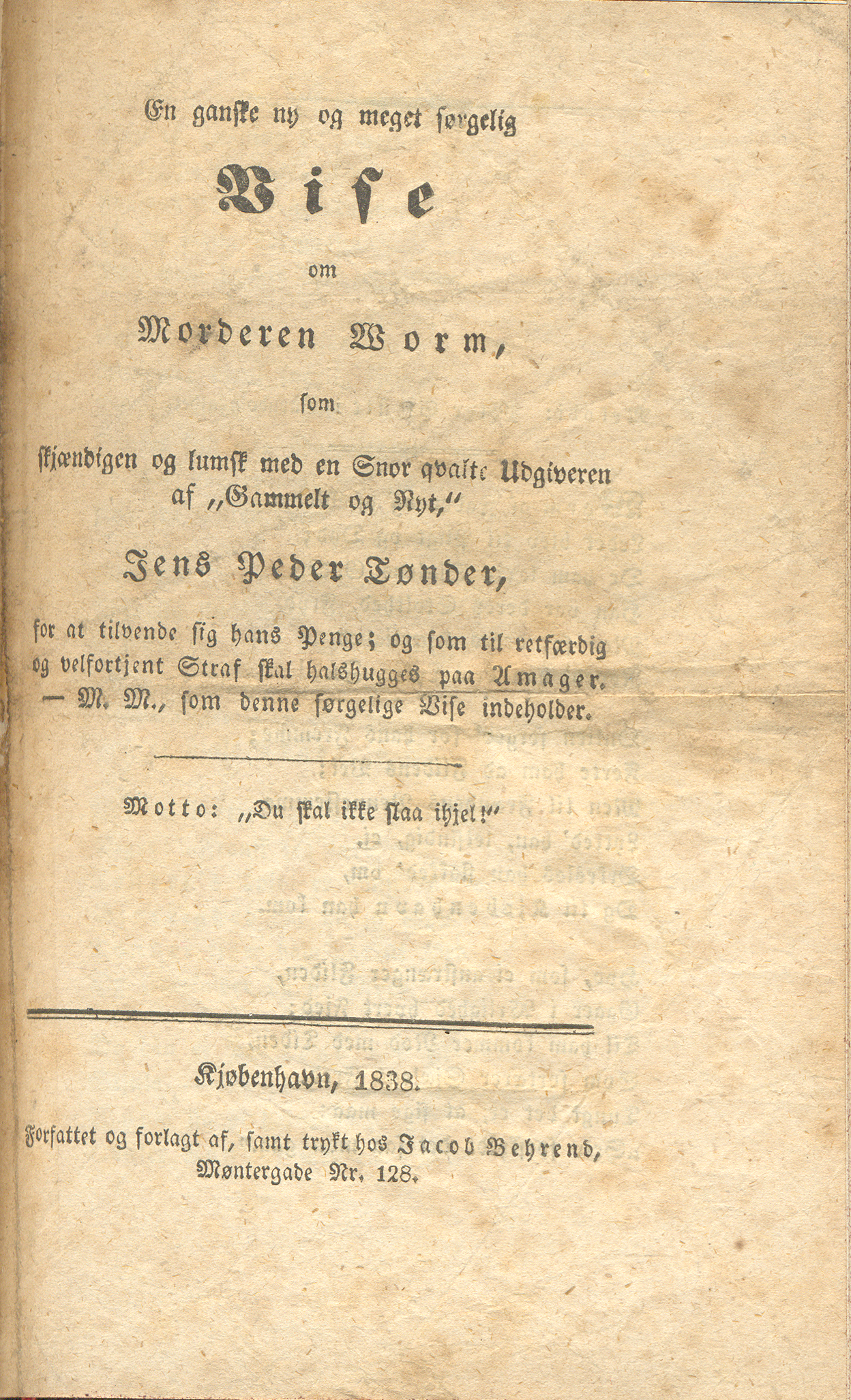 Hidtil ukendt skillingsvise om morderen Petri Worm, skrevet af Jacob Behrend og udgivet 1838.